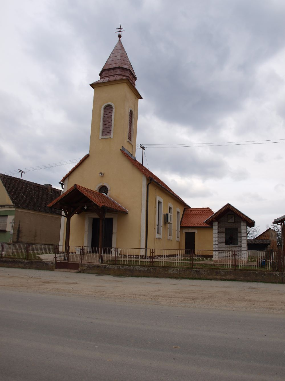 Crkva u selu Zbjeg, koje se nalazi u Brodsko-posavskoj županiji